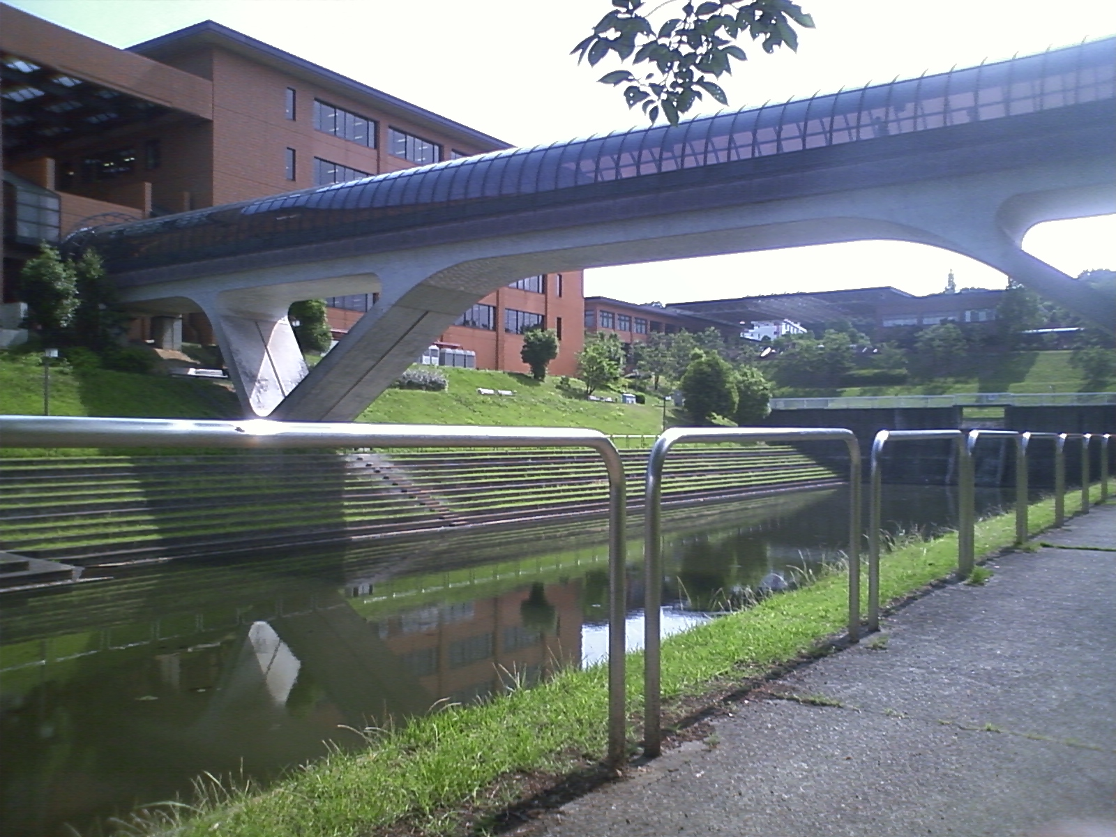 大東文化大学東松山キャンパス オーバーブリッジ